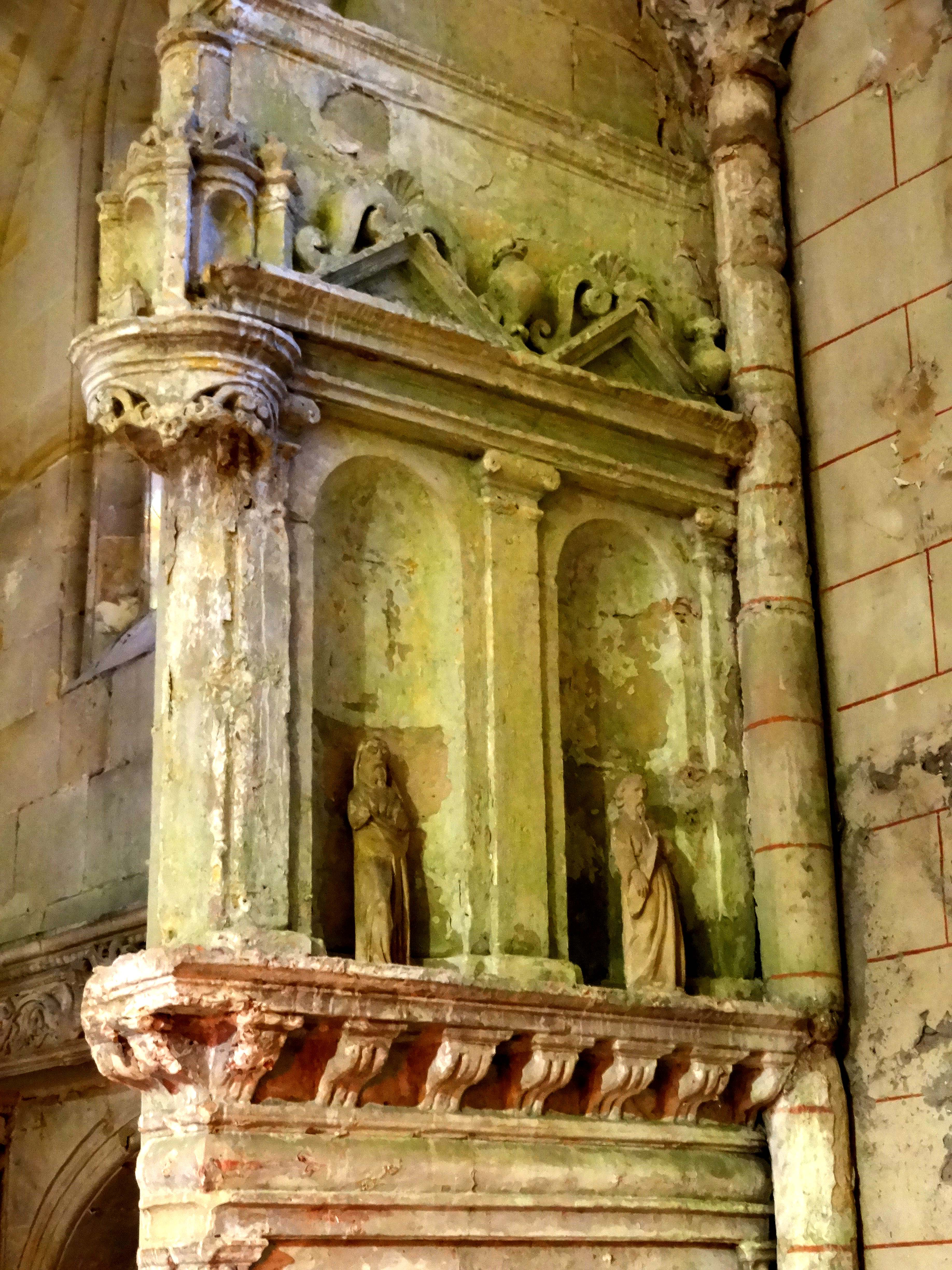 Mobilier de l'église - voir titre.